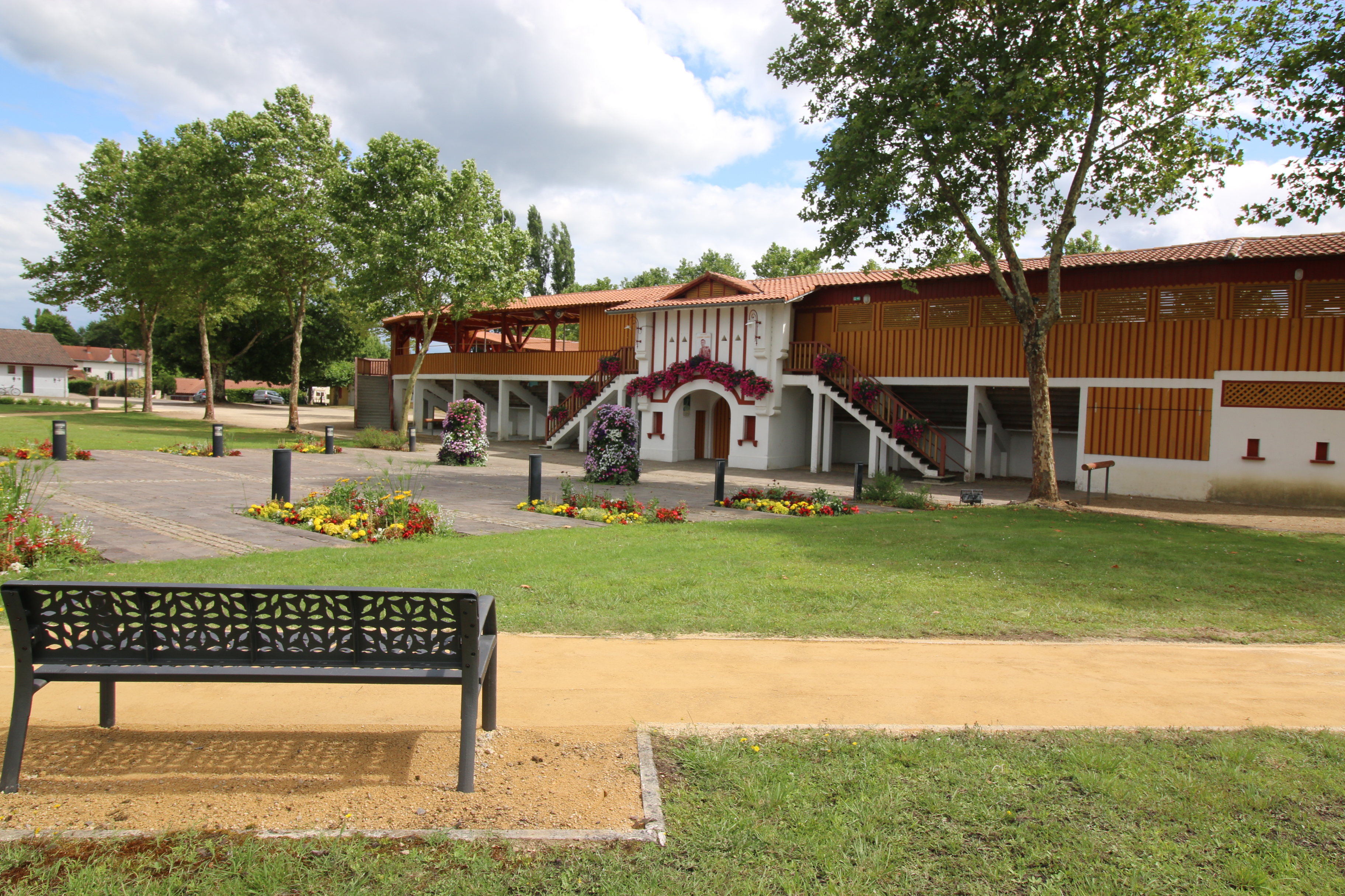 Arènes André Taris de Rion-des-Landes